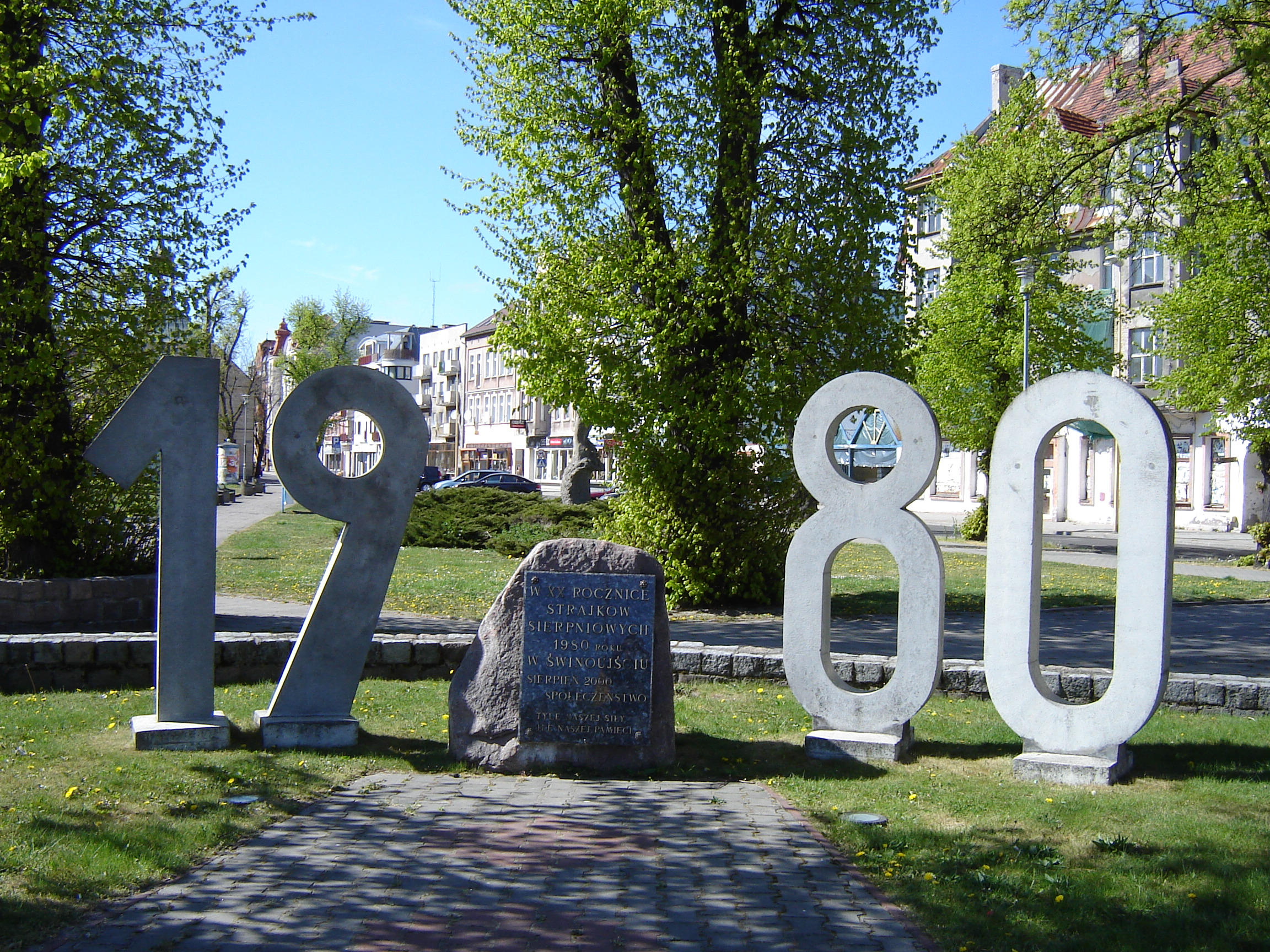 Pomnik w XX rocznicę wydarzeń sierpniowych'80 w Świnoujściu.